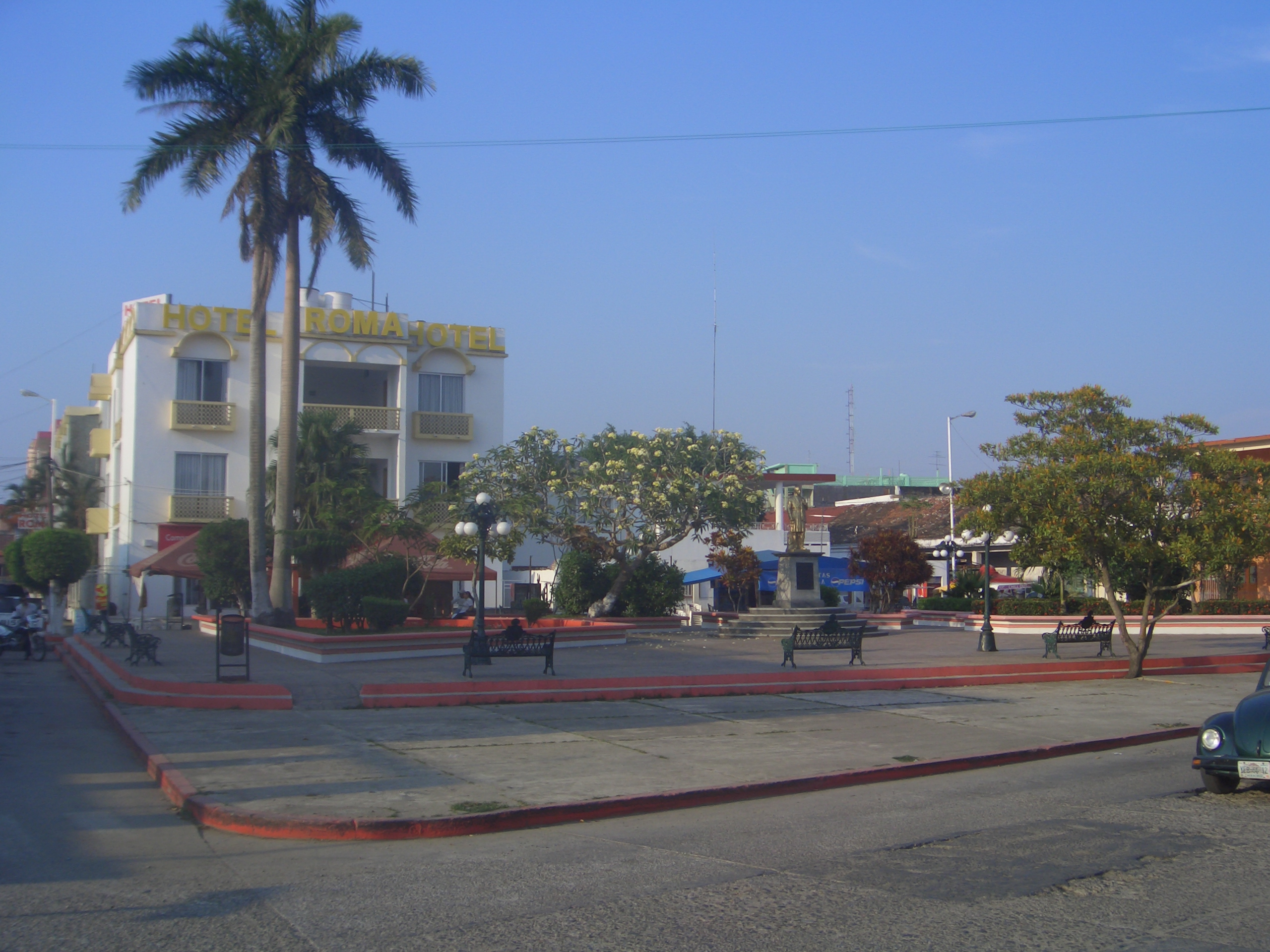 Parque Miguel Hidalgo en Cosamaloapan, Veracruz, México.